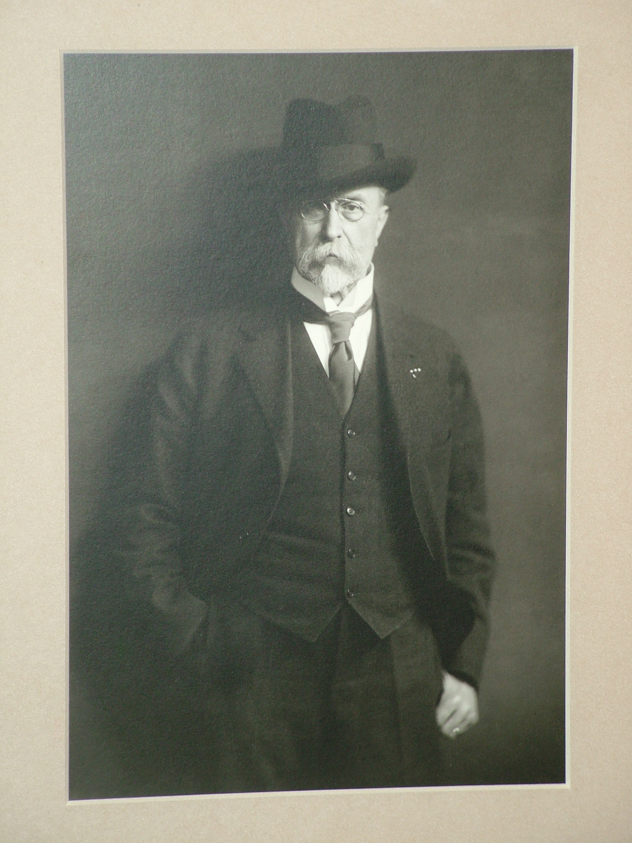 Fotografie z výstvay v Galerii Langhans, Praha